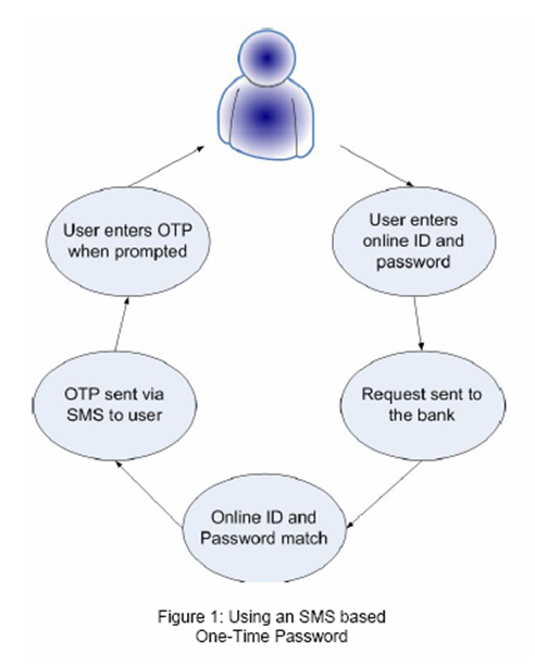 OTP par SMS